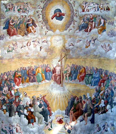 Affreschi di Domenico Pezzi, chiesa parrocchiale di Carona (Italia)